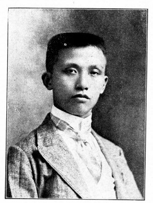 國會議員肖像